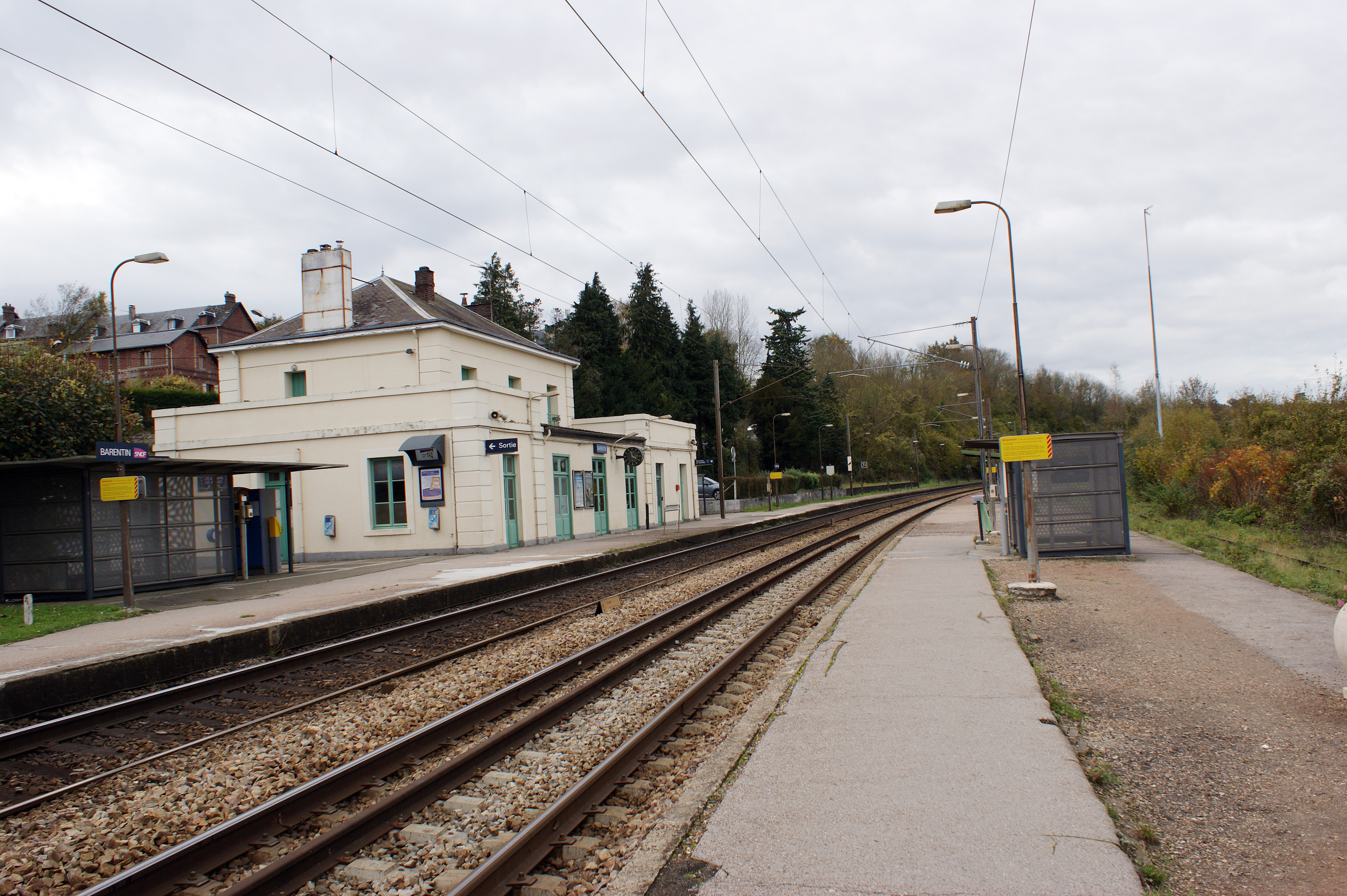 La gare de Barentin, vue en direction du Havre.